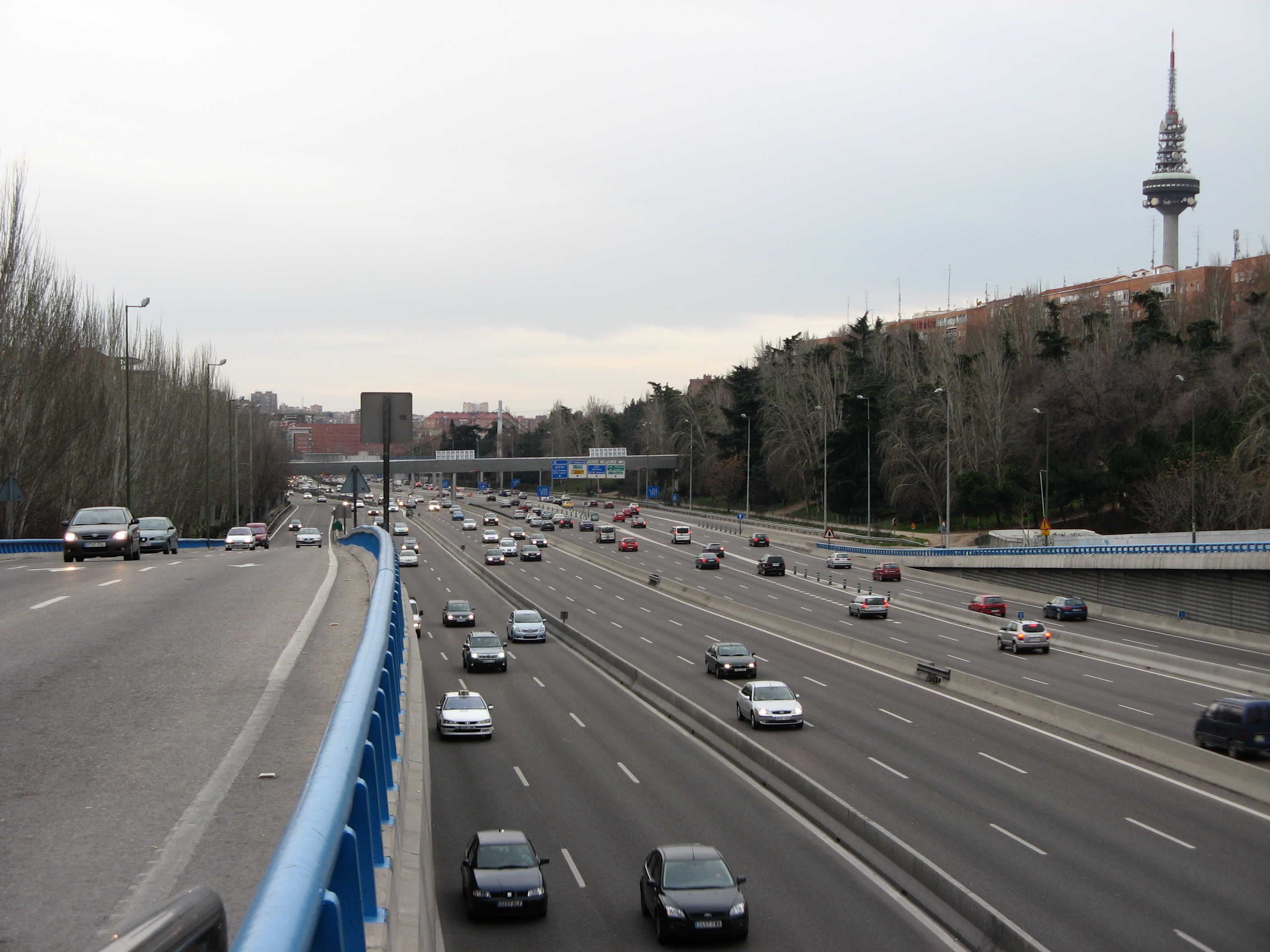 M-30 desde el puente de Ventas Madrid Comunidad de Madrid España